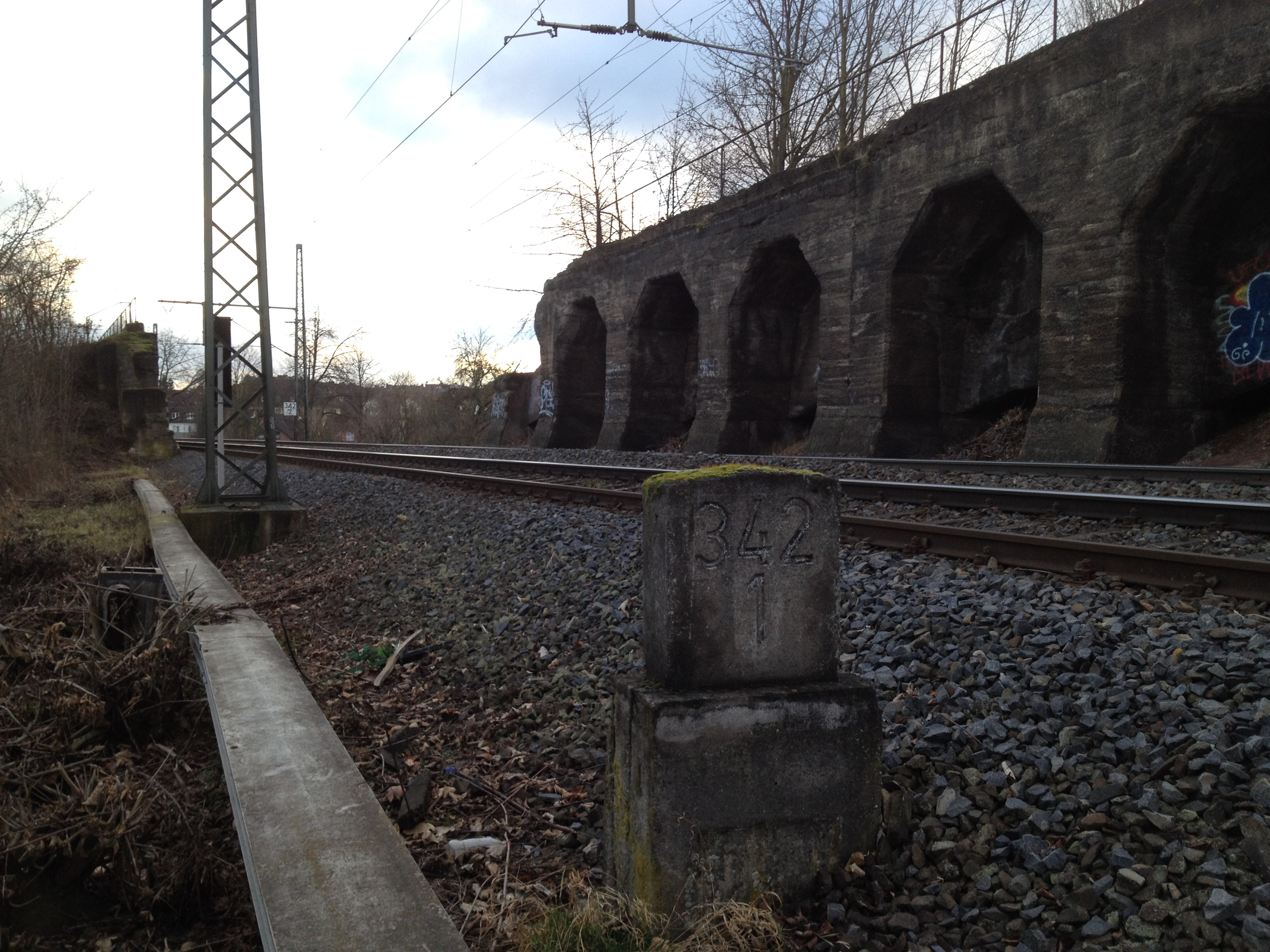 Ehemaliger Übergang des dritten Gleises, fotografiert vom Herlebergweg